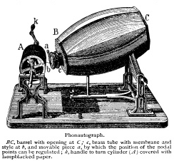 Phonoautograph